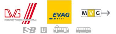 Logocollage von Via mit den Logos der DVG, EVAG und MVG